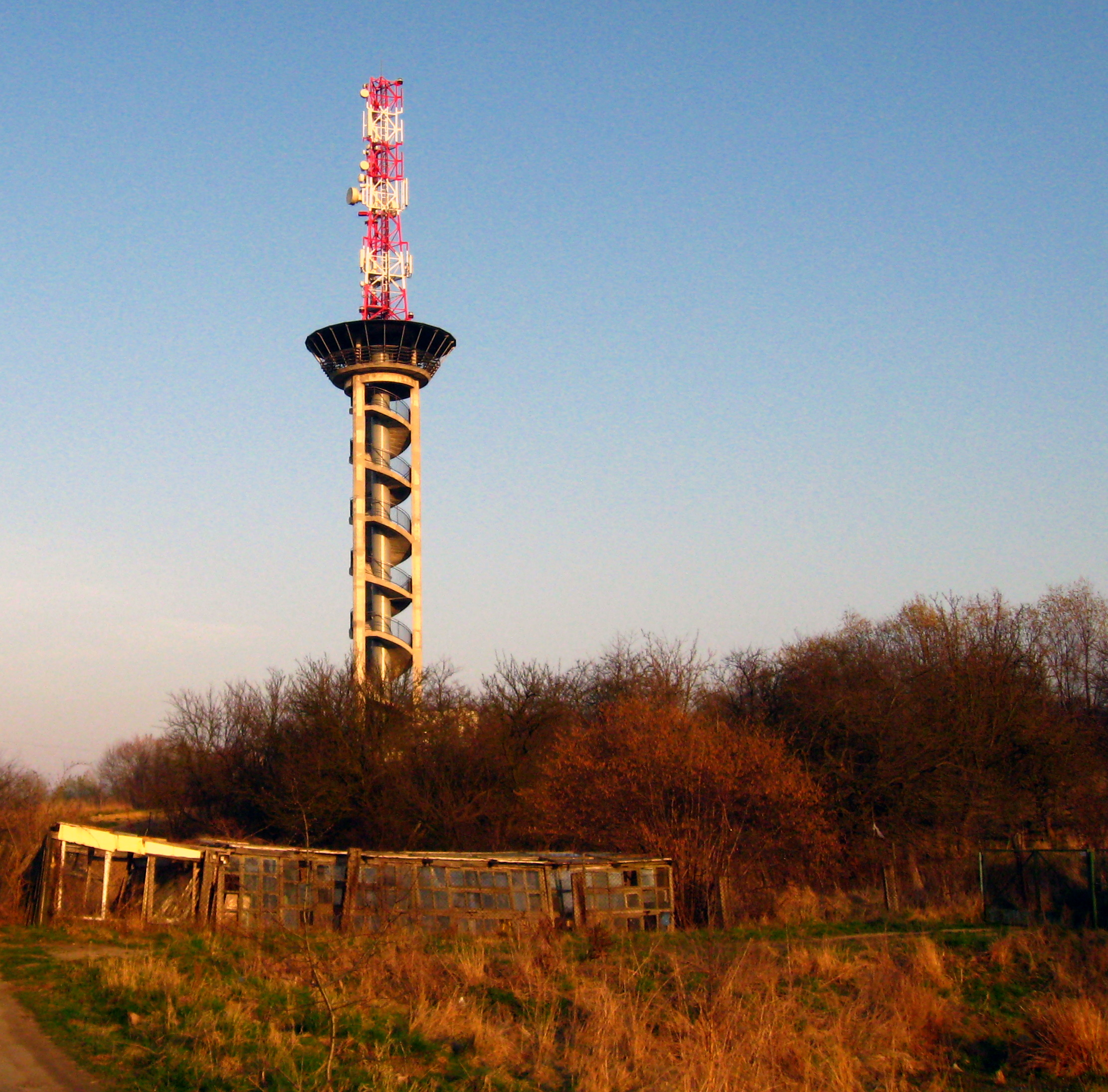 Wieża widokowa w Gdyni Kolibkach